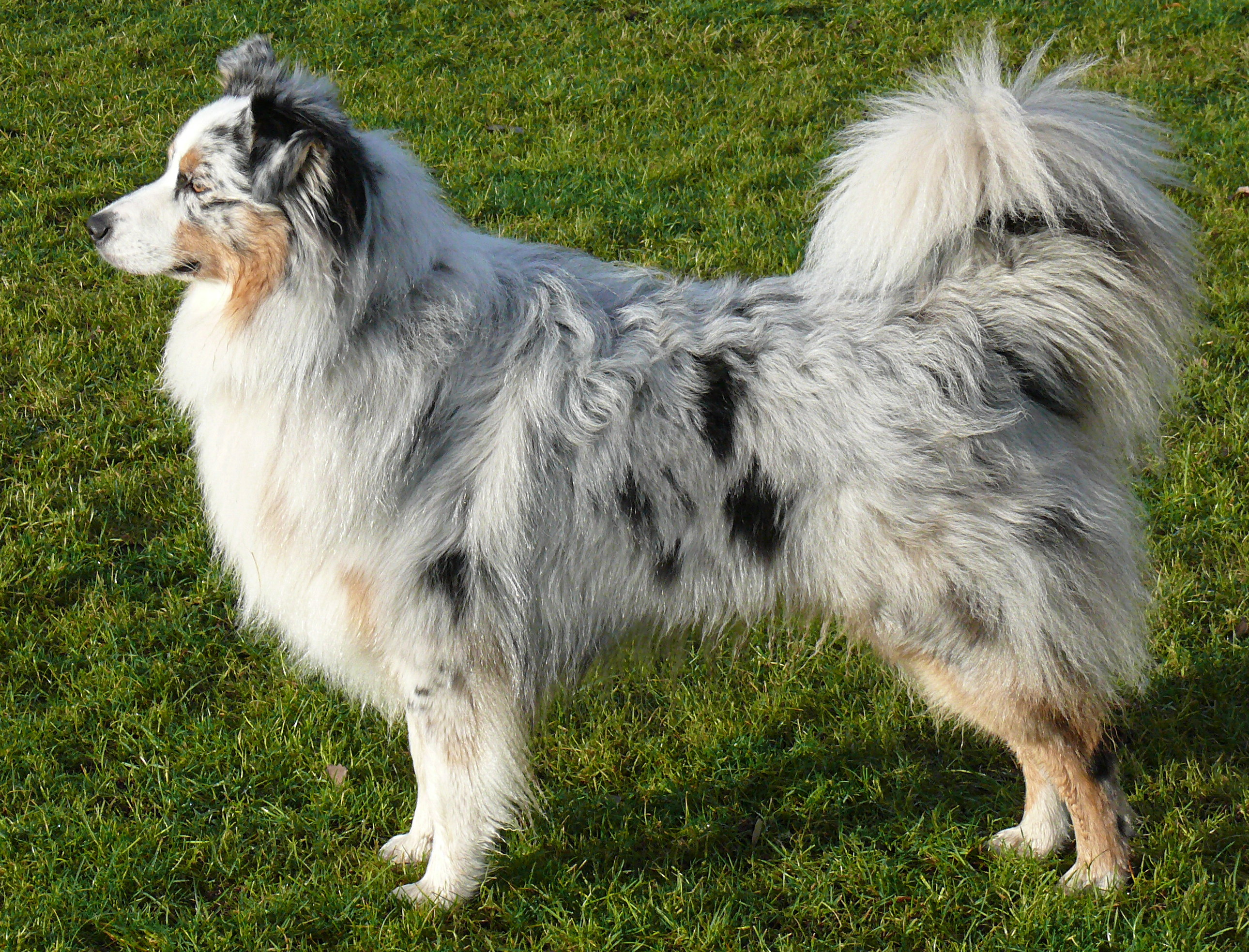 Magic Moonlights Pluto, age 12 months